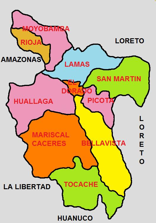 Division Politica del Departamento de San Martín, una de las 25 circunscripciones en que se divide el Perú